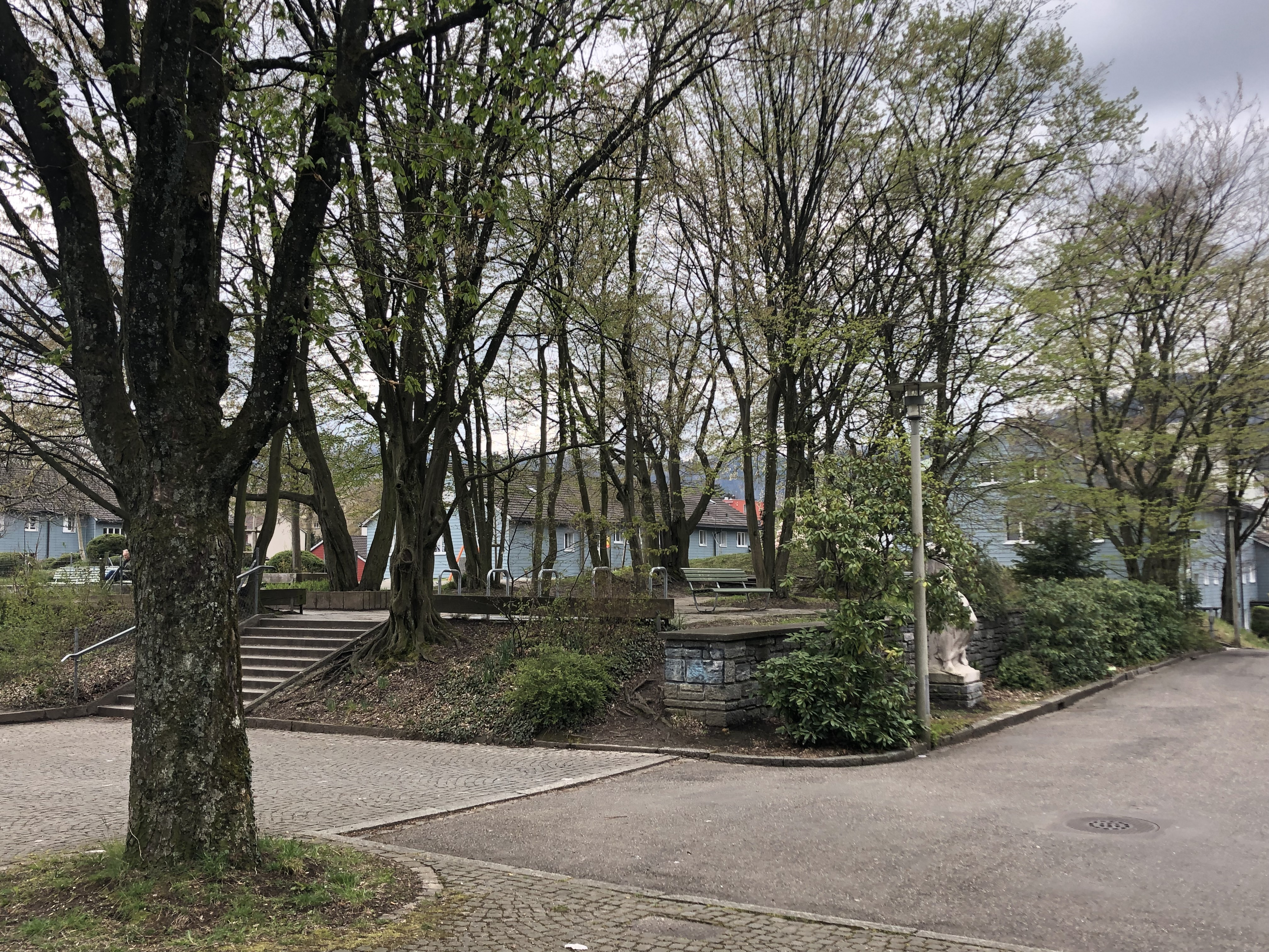 Wollishofen Auf der Egg